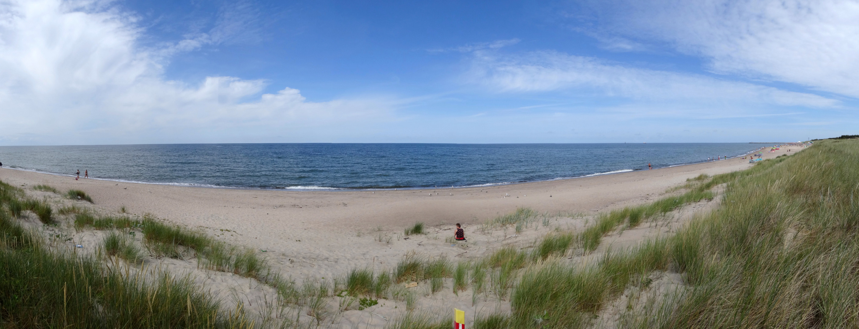 Plaża w Darłówku Zachodnim